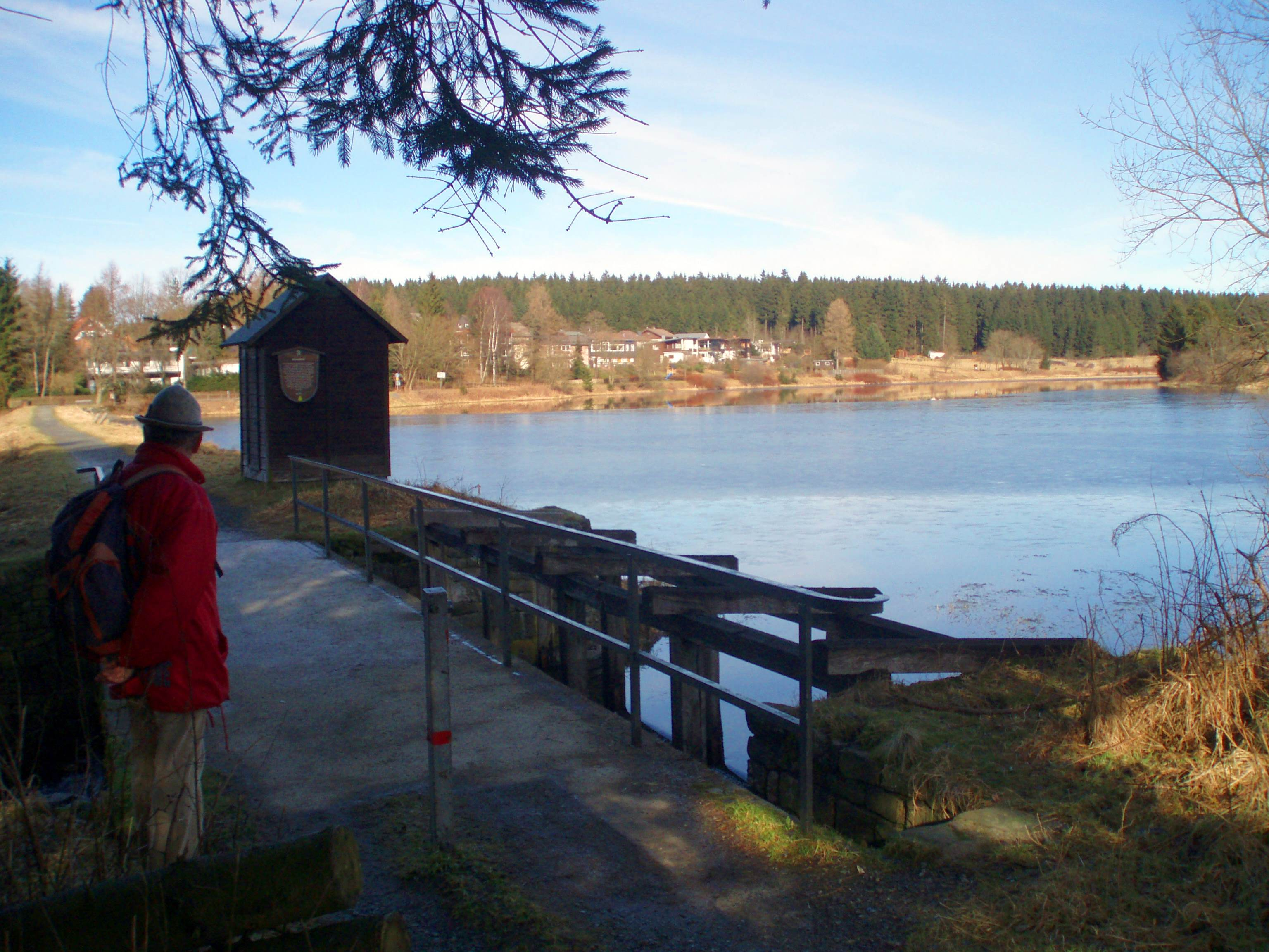 Sumpfteich in Buntenbock